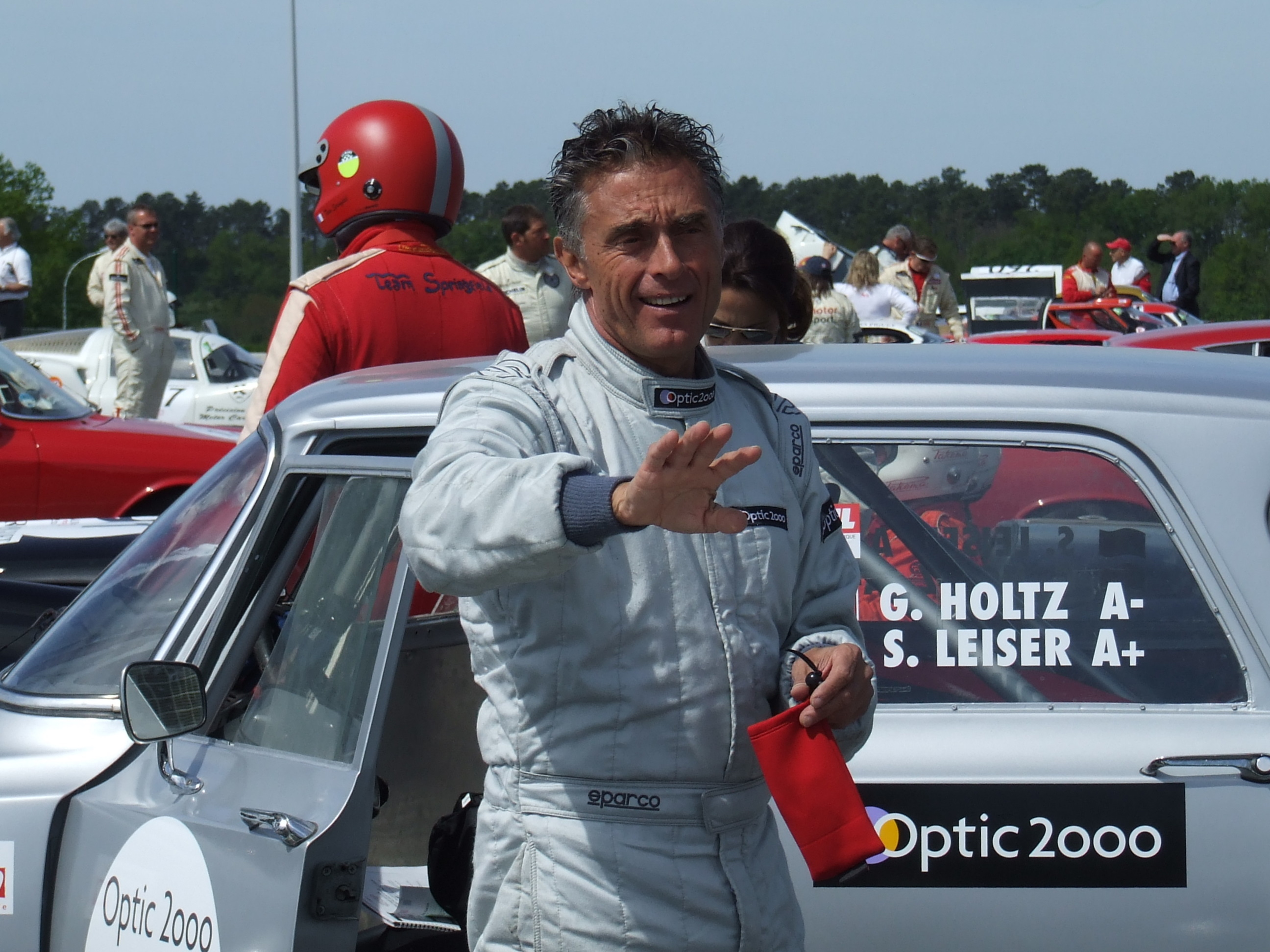 Gérard Holtz participant au Tour Auto Historique 2011